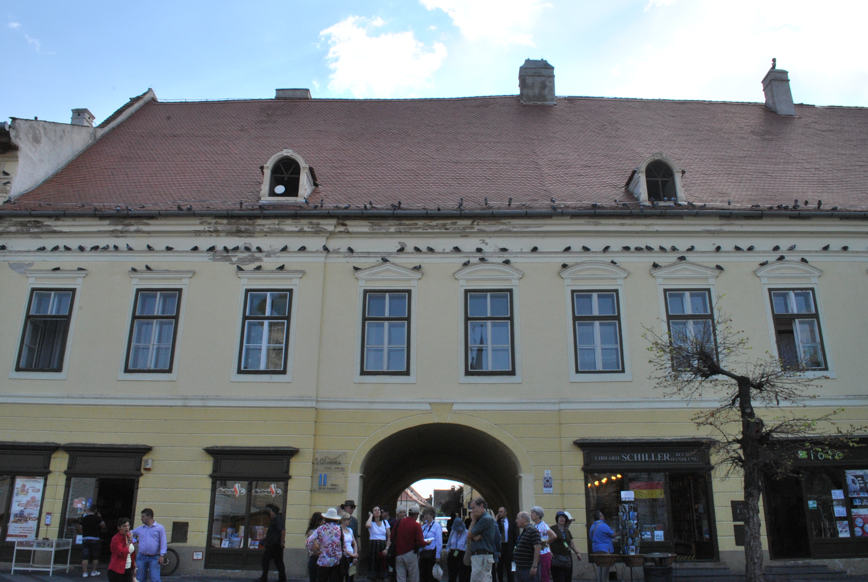 Casă, (Piata Mare nr.7) sec. XV - XVIII, sec. XX